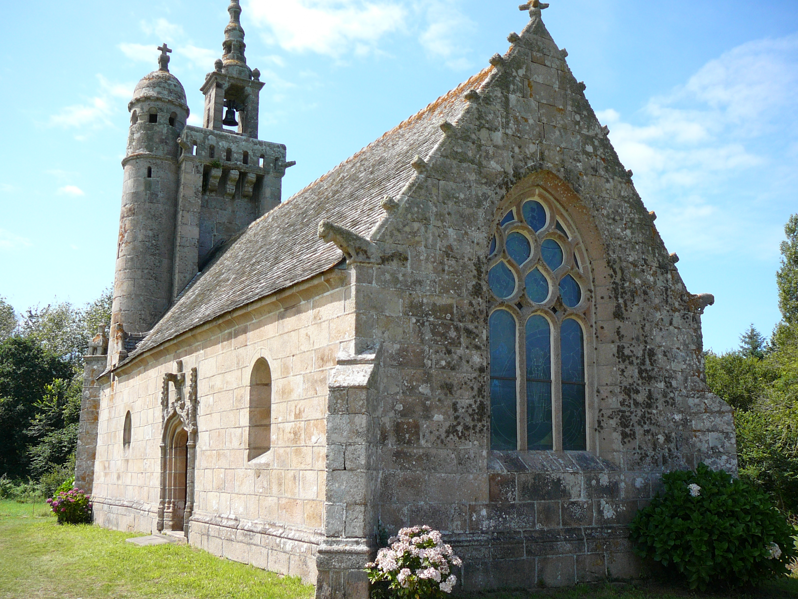 Chapelle de Saint Samson, commune de Pleumeur Bodou (22)